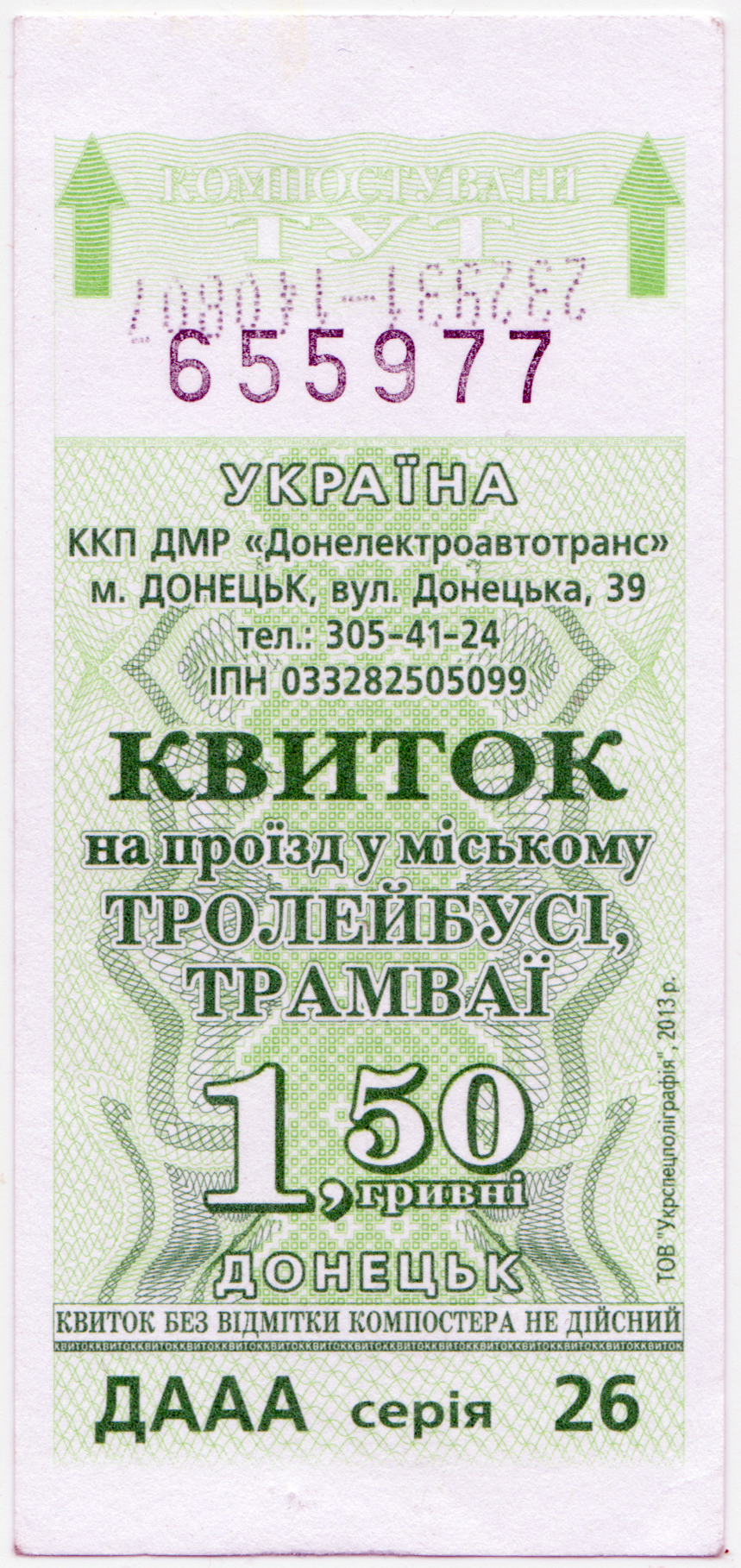 Разовий квиток на проїзд в громадському транспорті